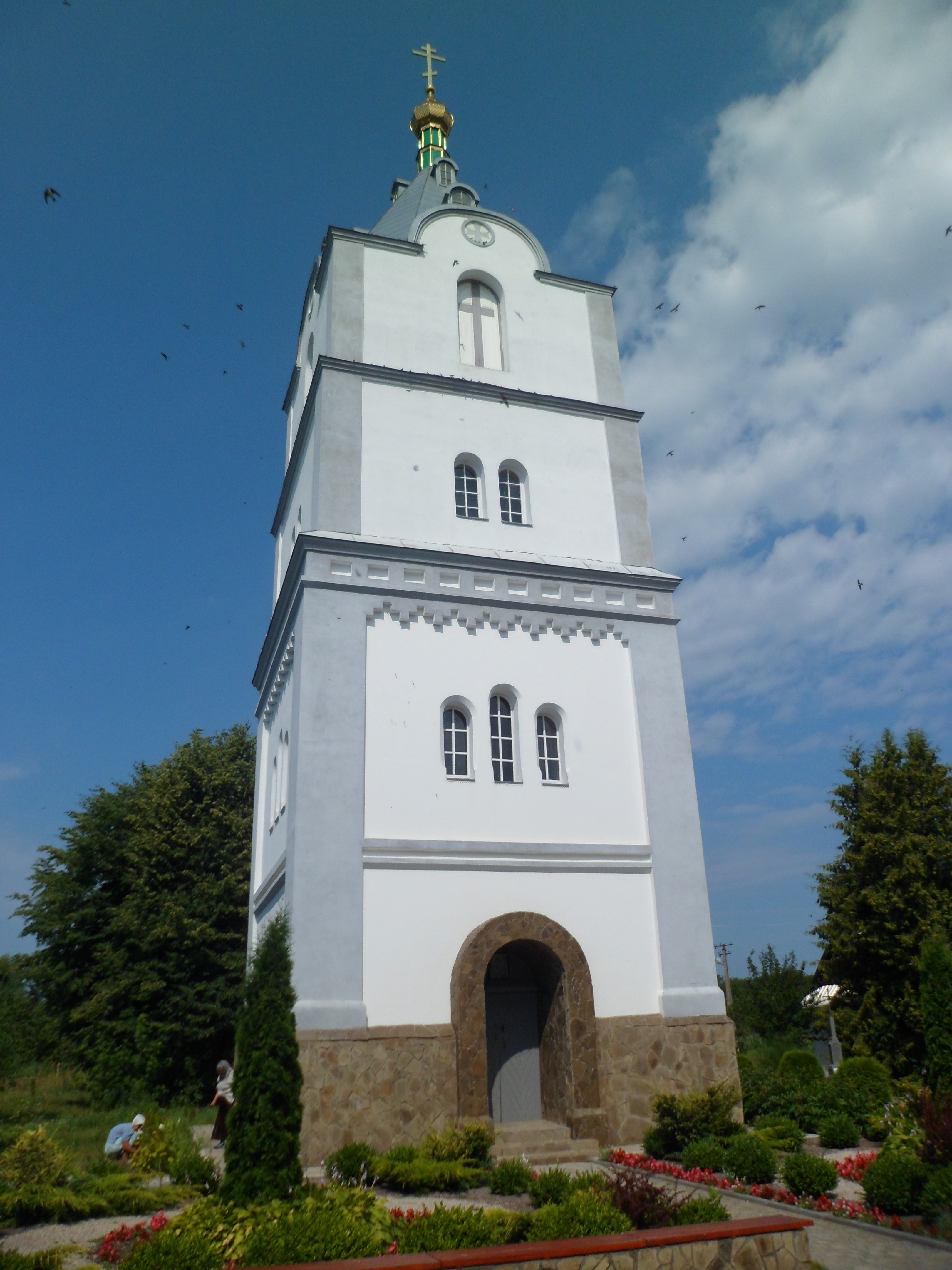 Дзвіниця (мур.), Мильці